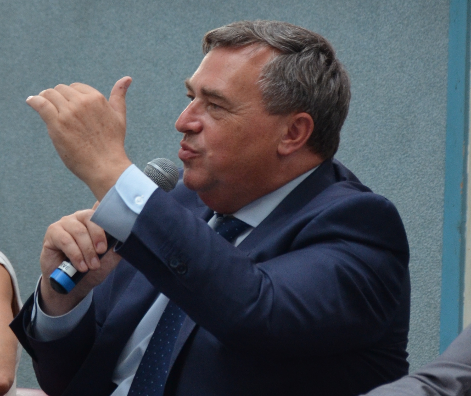 Olivier Carré, homme politique, maire d'Orléans et président d'Orléans Métropole.